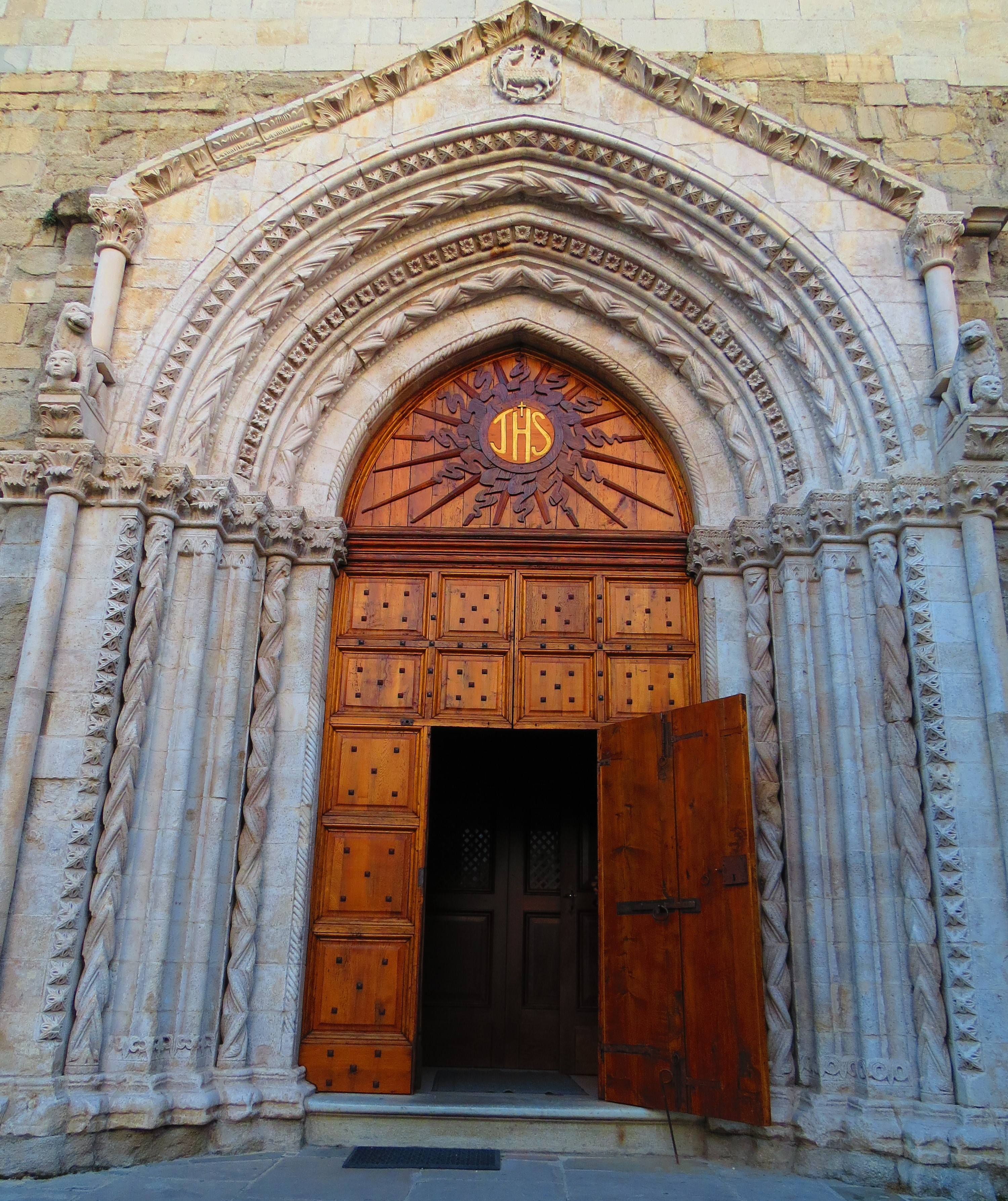 Agnone